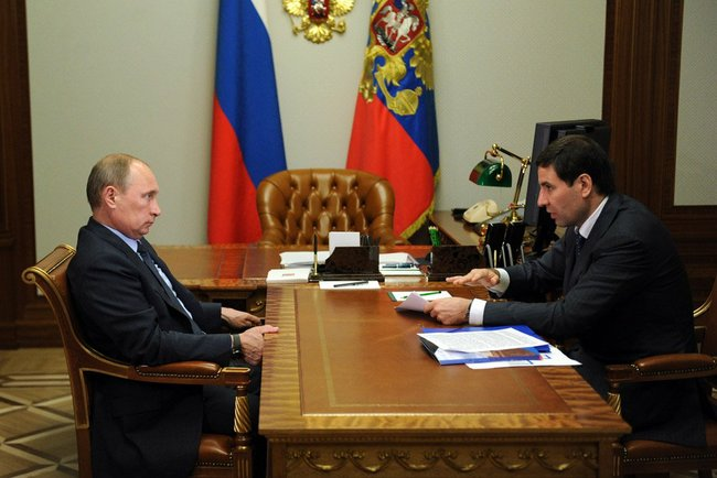 С Губернатором Челябинской области Михаилом Юревичем